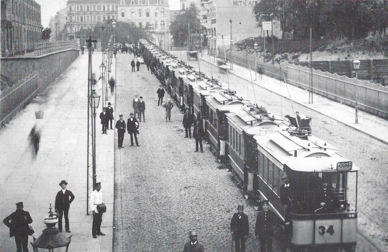 Triebwagen der Stadtbahn zwischen Riebeckplatz und Hauptbahnhof in Halle (Saale)